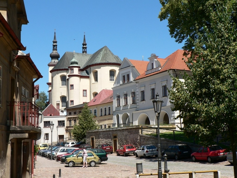 Litomyšl, Šantovo náměstí, pohled na piaristický kostel Nalezení sv. Kříže.